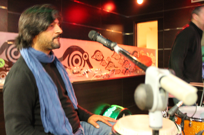 José el Francés durante la prueba de sonido previa a su actuación en Sala Gala, Hernani, el 08/04/2012